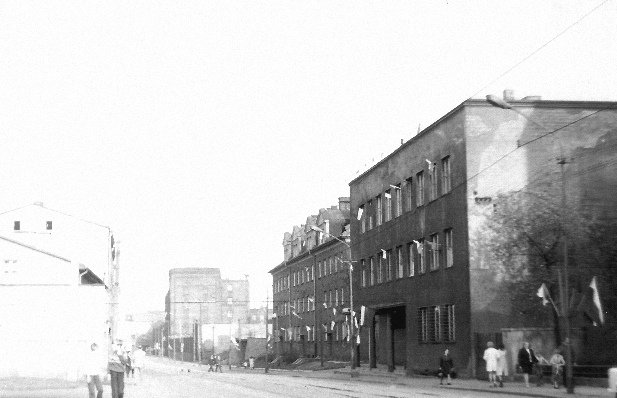 Katowice Szopienice-ulica Obrońców Westerplatte w latach 70. XX wieku.Zdjęcie z mojego domowego zbioru.